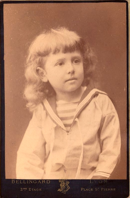 Photographie au format cabinet, jeune garçon en costume marin, vers 1890. Papier albuminé, Pierre Ballingard, Lyon.